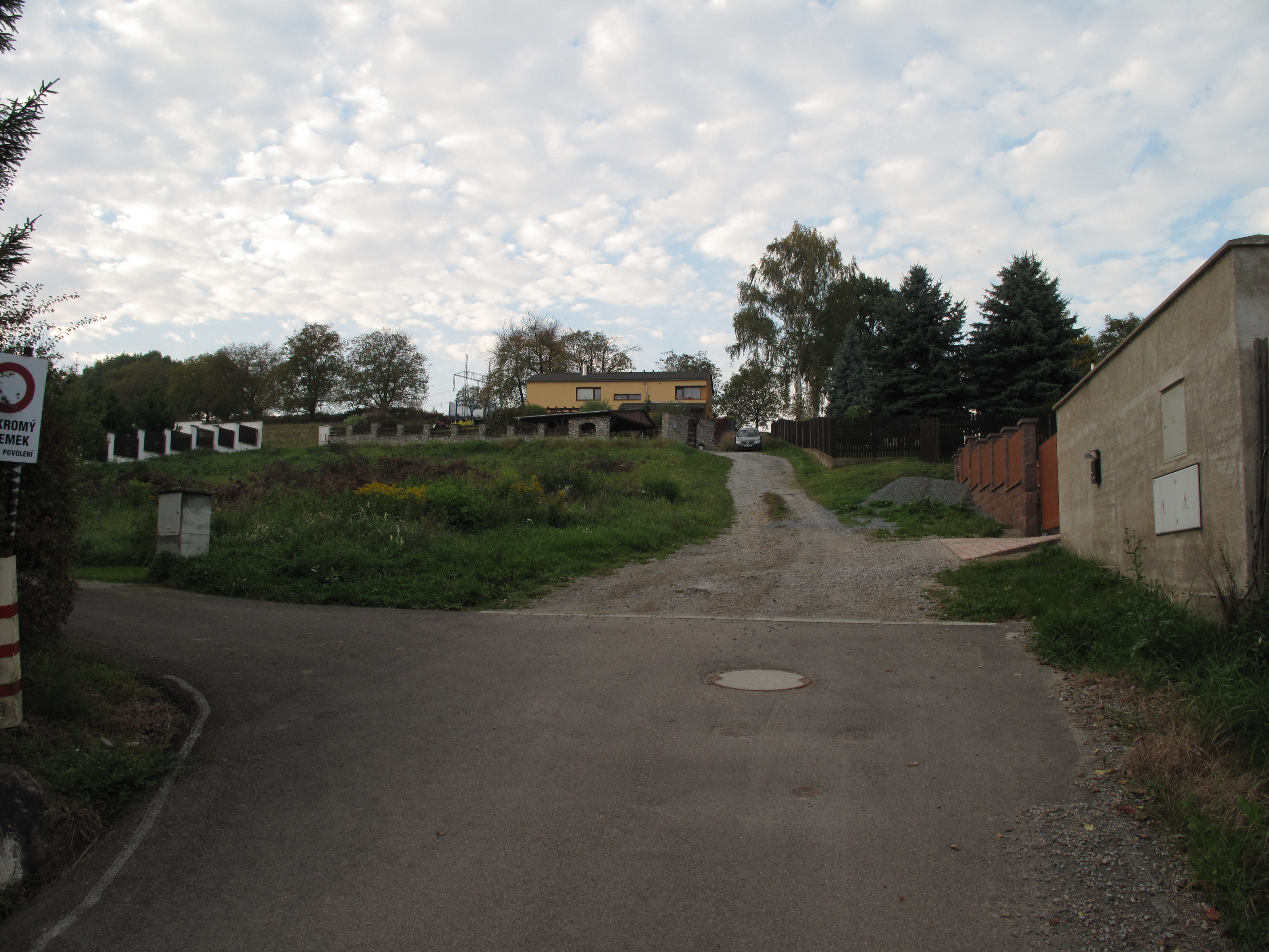 Do Kopce v Nové Vsi. Okres Benešov, Česká republika.